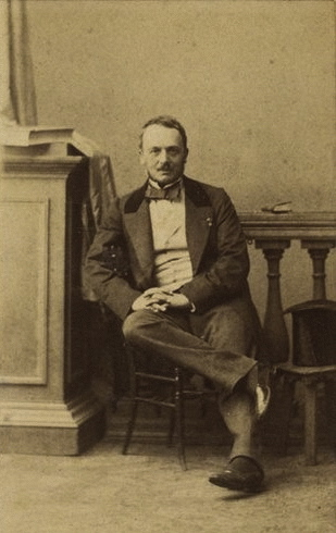 Baron de Romand